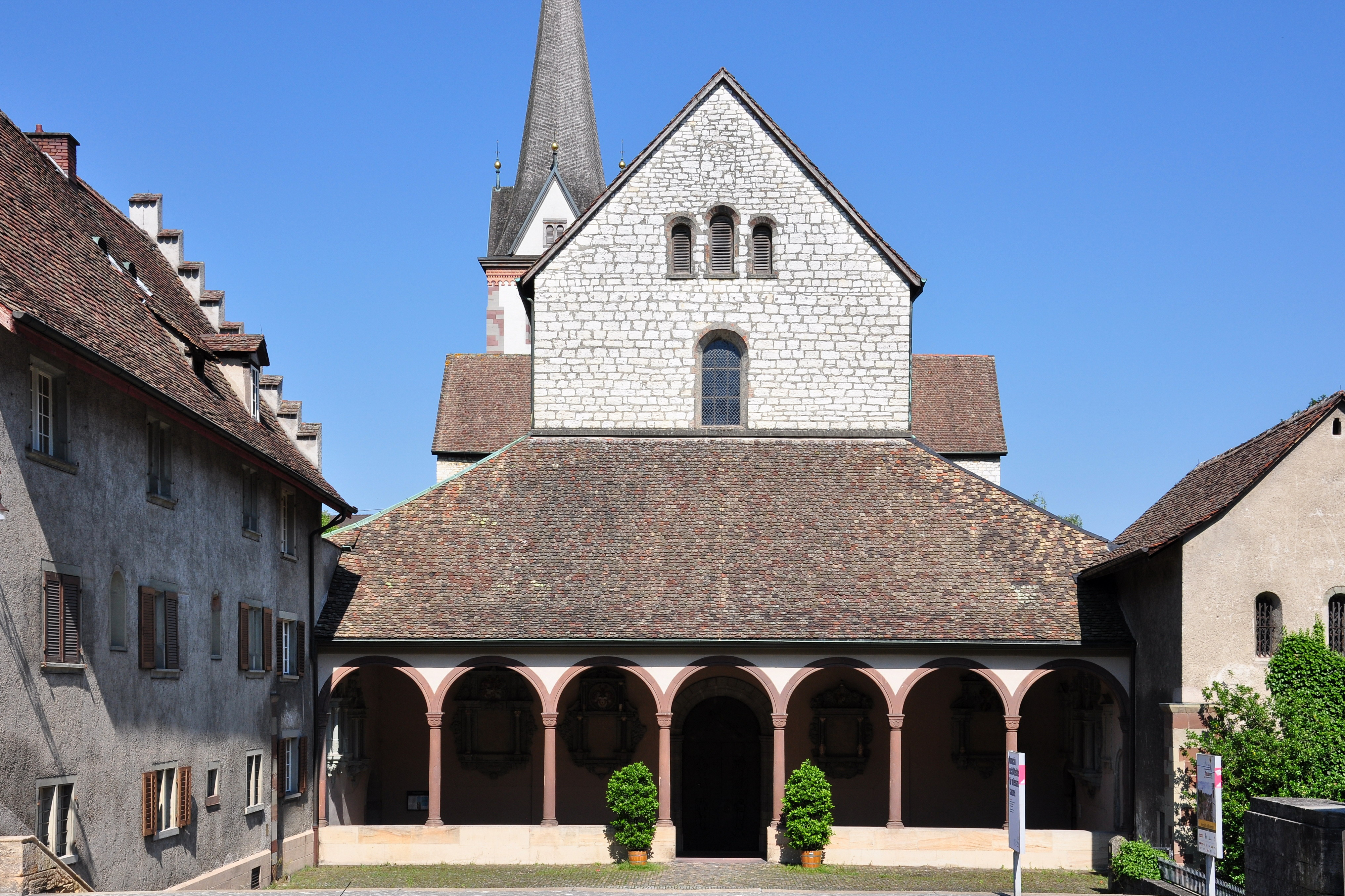 Kloster Allerheiligen in Schaffhausen (Switzerland)